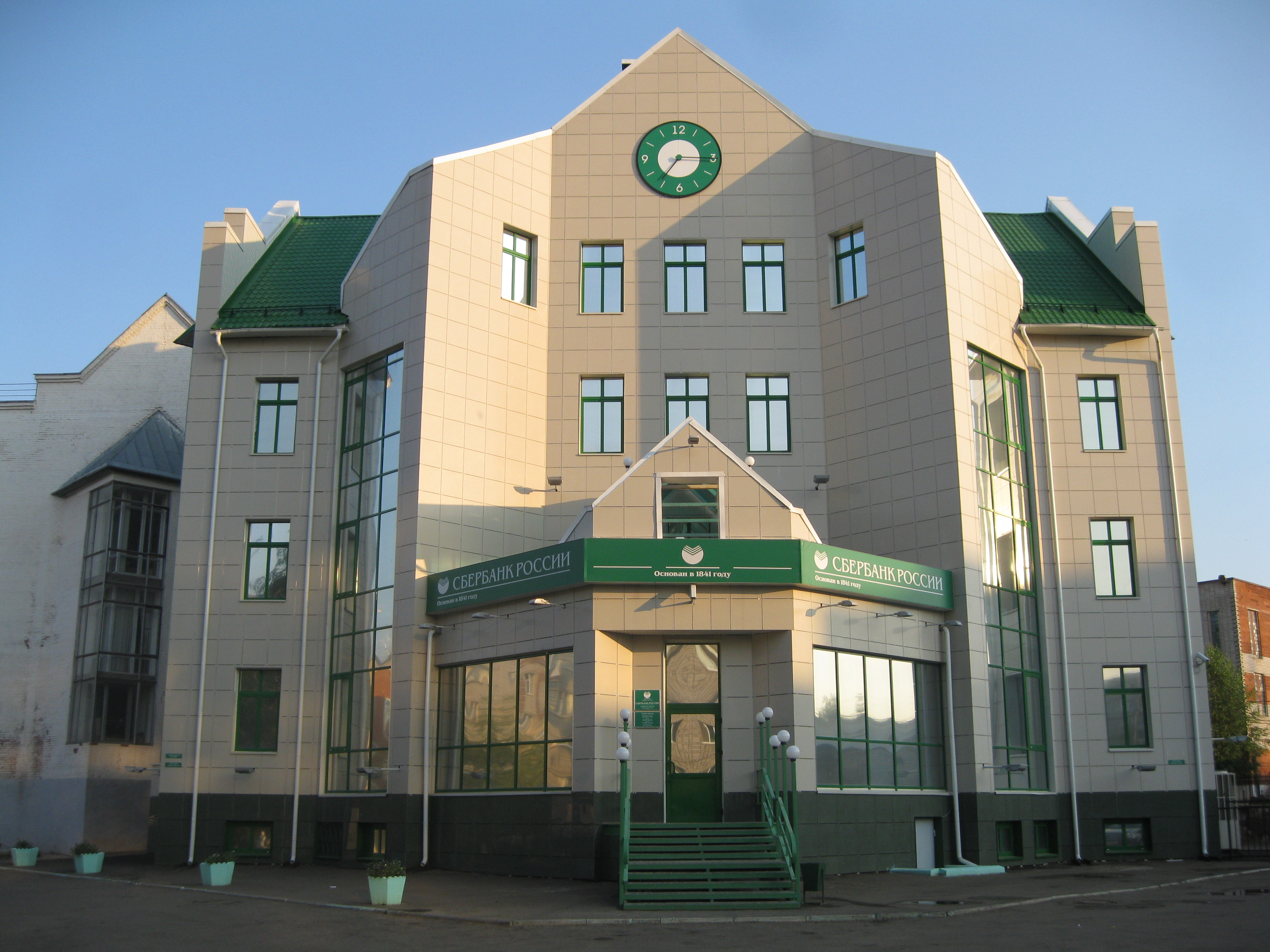 Офис Чернушинского отделения №1668 Западно-Уральского Банка Сбербанка России. (г.Чернушка, ул.Мира, д.29).